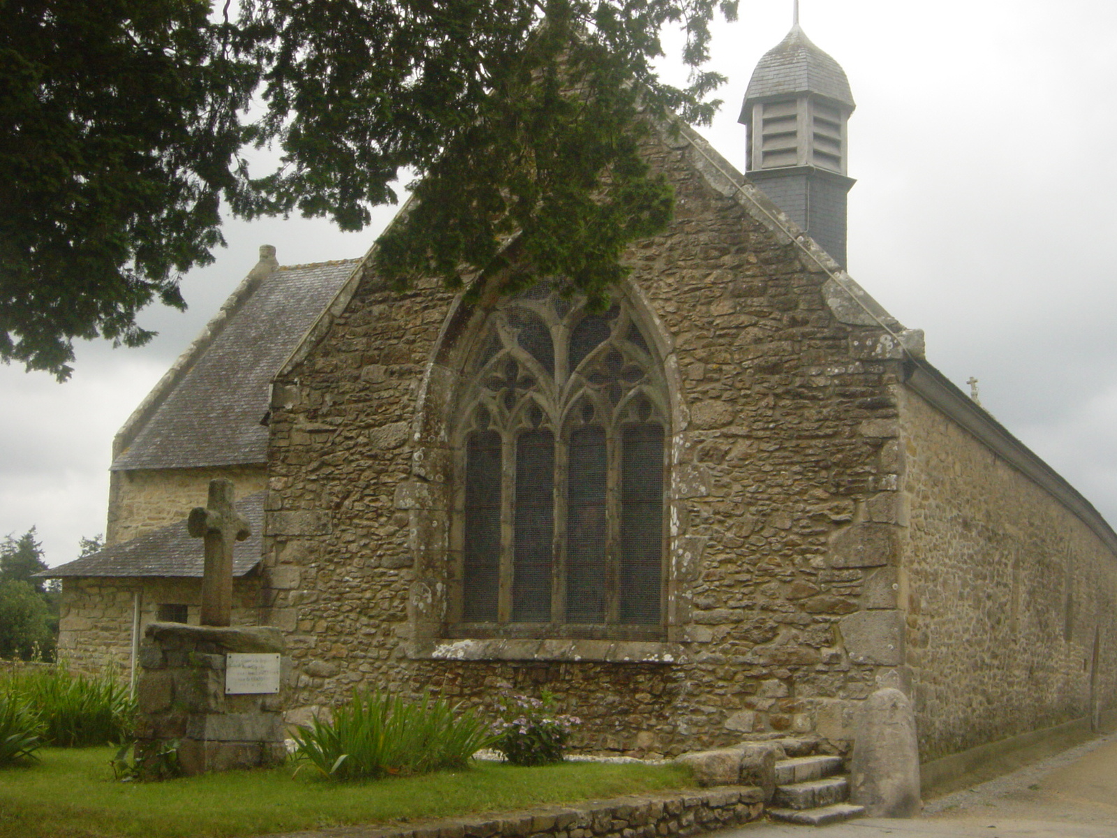 chapelle Sainte Anne de Brandérion